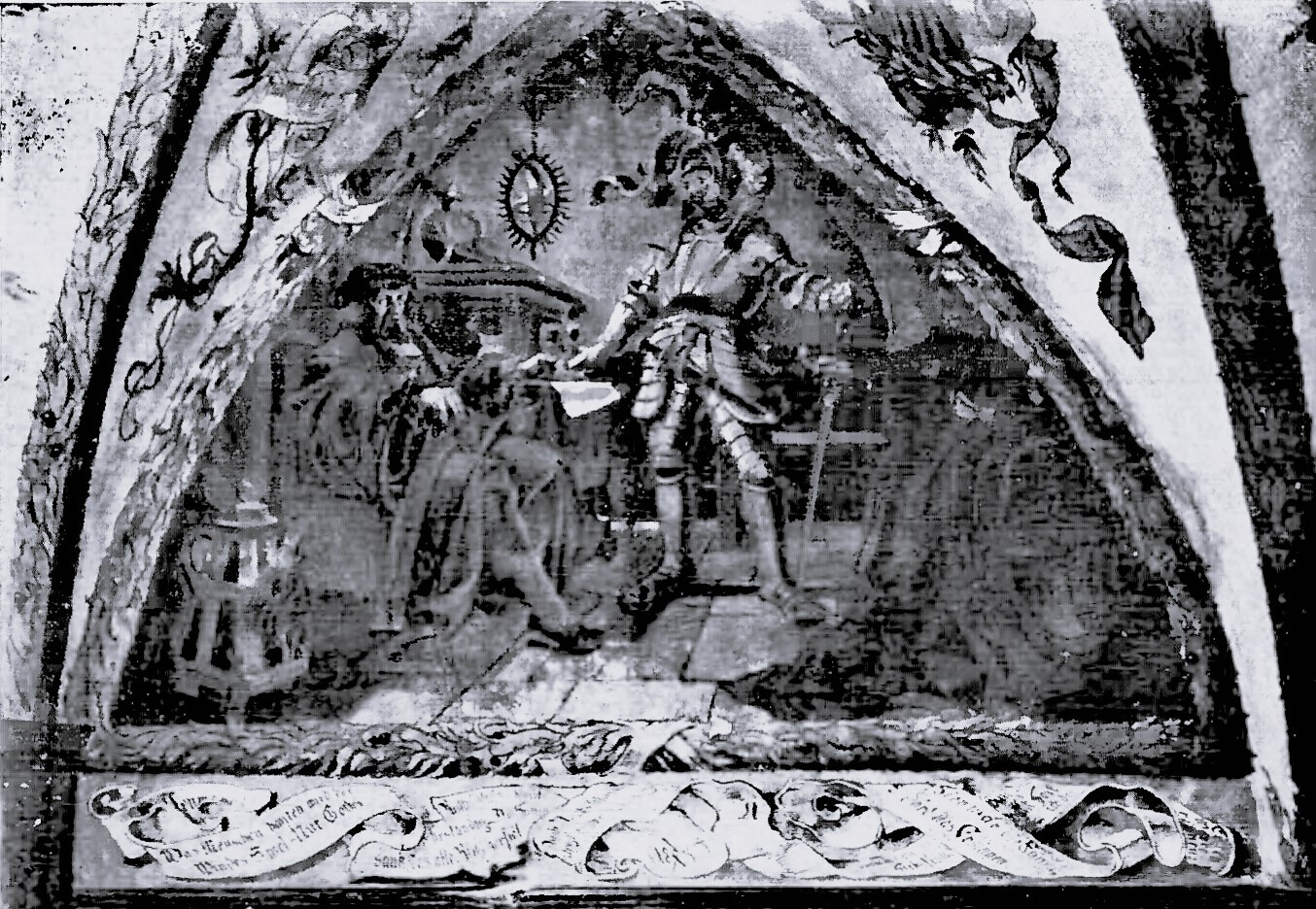 Jürgen Wullenweber und Marx Meyer (aus der Geibelschen Septembernacht) in der Rose des Ratskellers